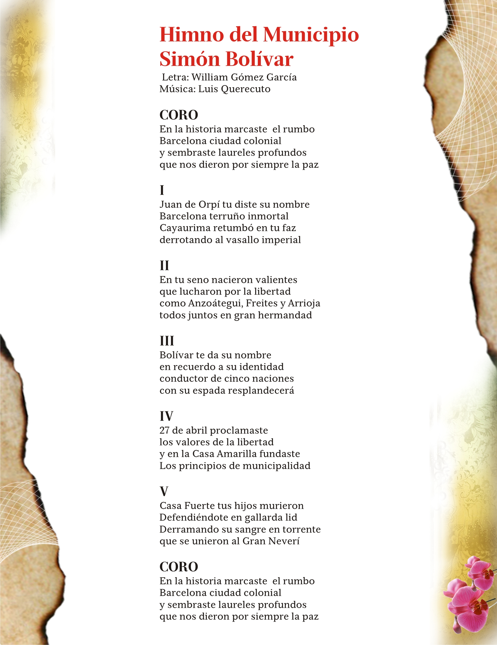 Himno del municipio Simón Bolívar (municipio capital) del estado Anzoátegui, aprobado por el Concejo Municipal en conmemoración del aniversario de Barcelona, capital del estado Anzoátegui